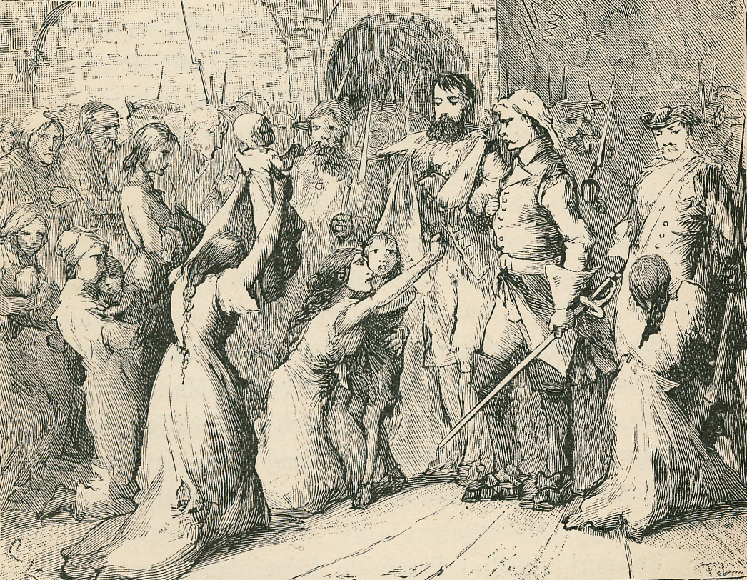 Kajaanin linnan päällikkö Fieandt linnaan paenneiden perheiden ympäröimänä. Carl Larssonin kuvitusta Välskärin kertomuksiin vuodelta 1884.